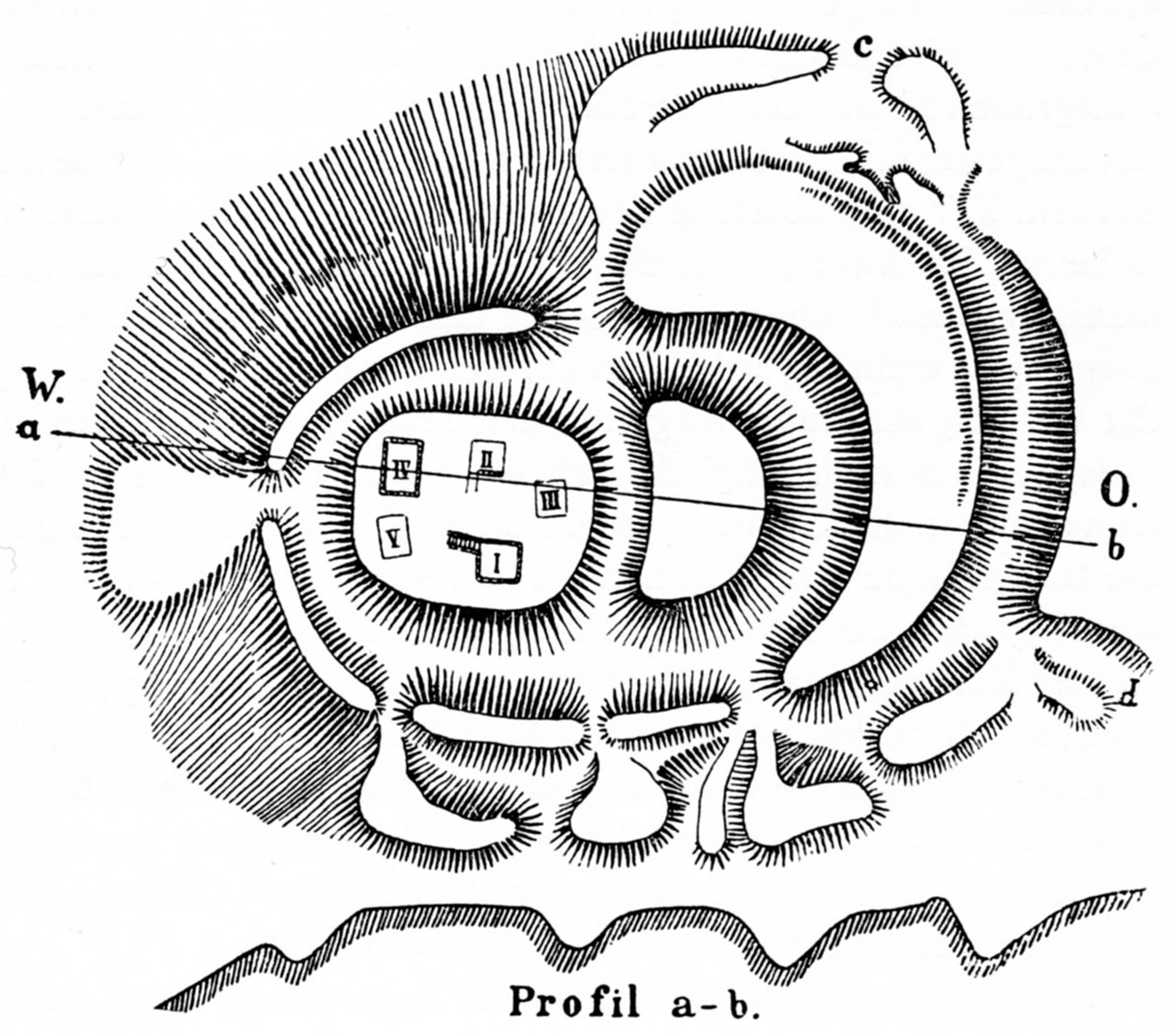 Lageplan der Burg Alt-Sternberg von Carl Schuchhardt (1859-1943)